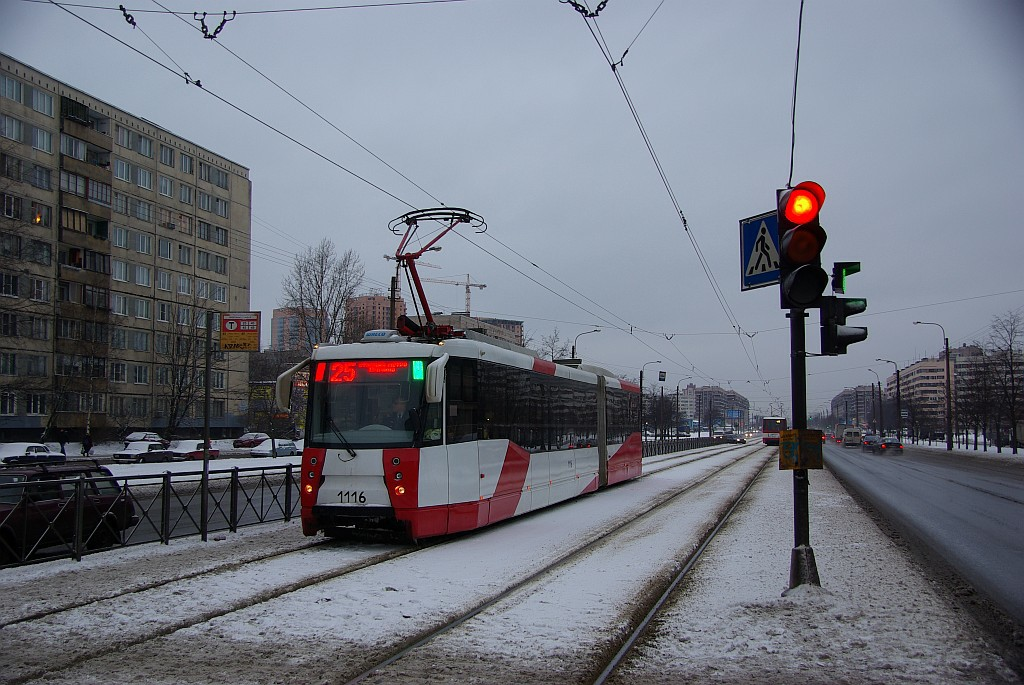 Sankt-Peterburg tram LVS-2005 1116_20081220_0013